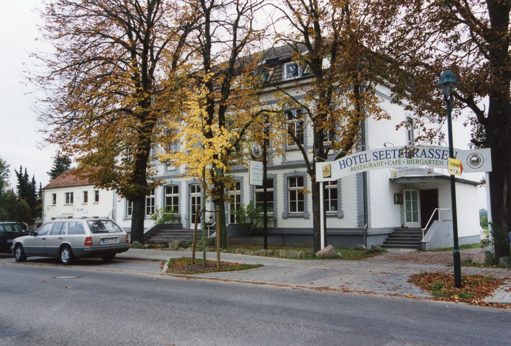 Ortsteil Wandlitz der Gemeinde Wandlitz, Restaurant und Hotel "Seeterrassen"